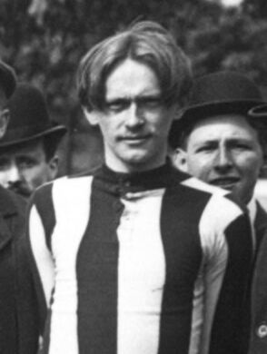 Gabriel Hanot avec l'Union sportive tourquennoise le 1er mai 1910 avant la finale du championnat de France de football USFSA 1910.